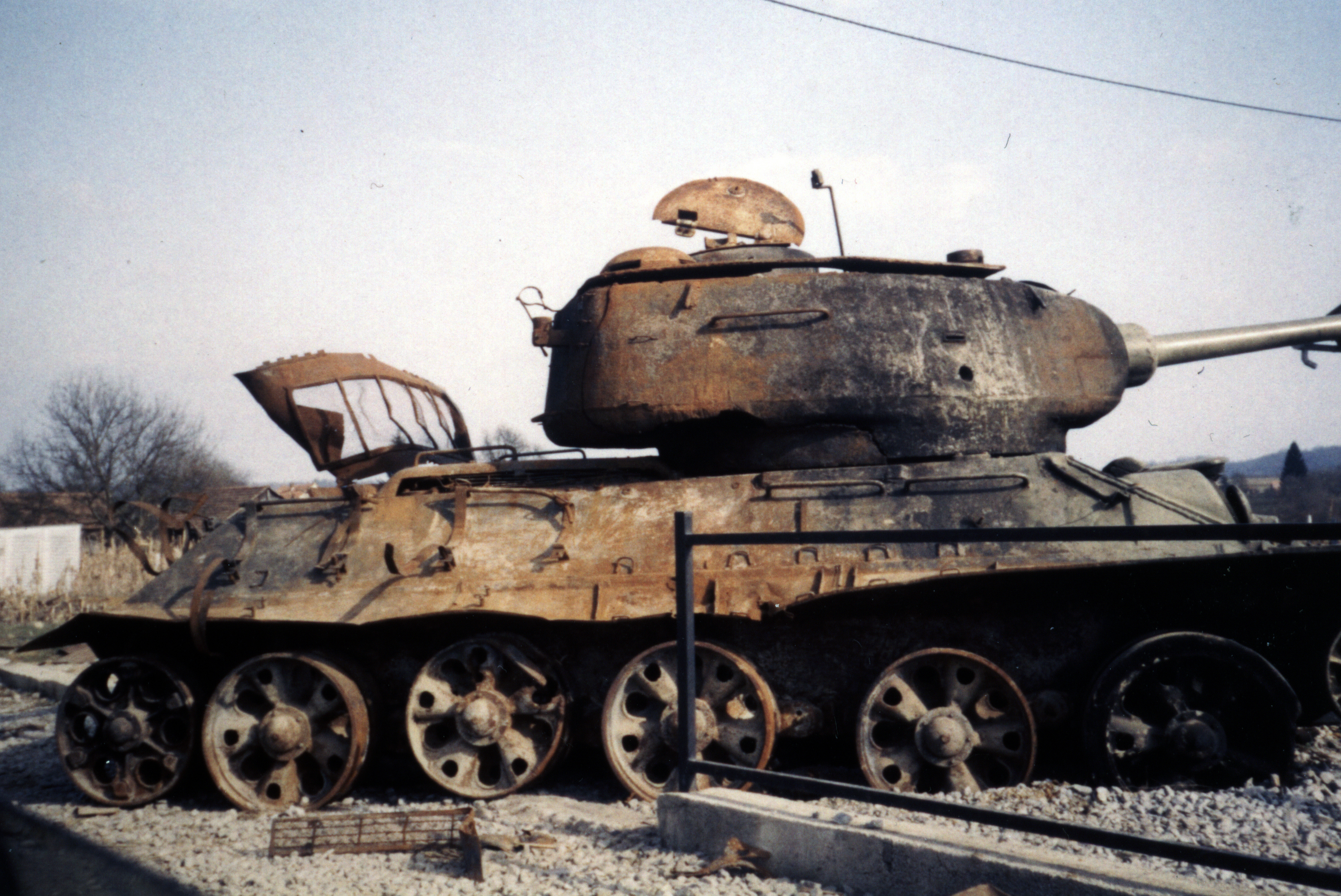 T-34-85 tank in Karlovac destroyed by croatian troops, Croatia near the cease-fire line.